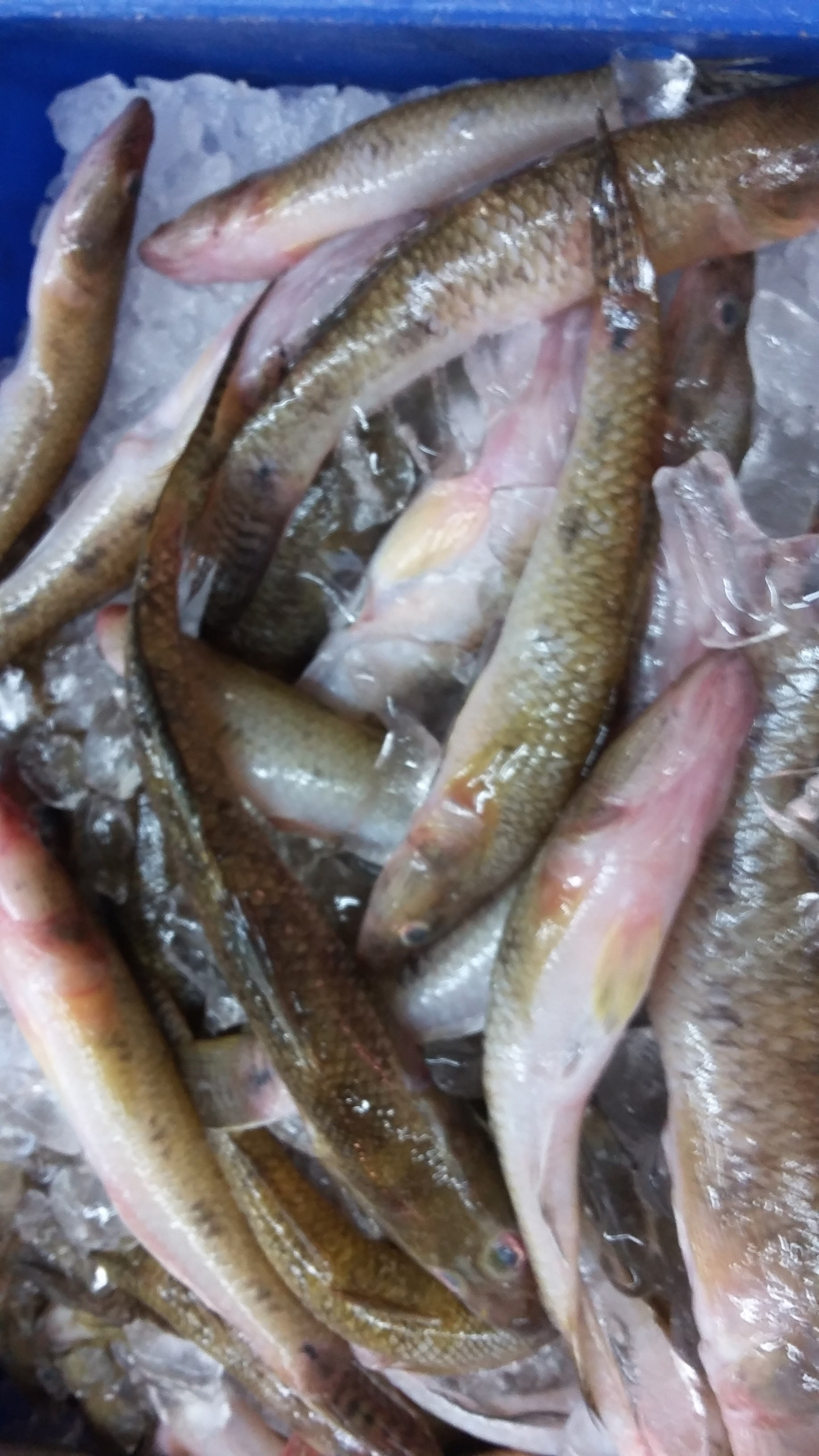 Cá bống đục (cá đục) ở Việt Nam tại siêu thị BigC Phú Thạnh